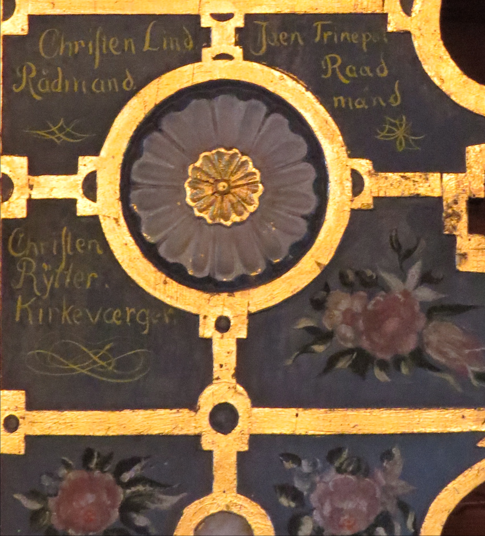 Christen Lind. Rådmand, Joen (Jaen?) Trinepol Raadmand, Christen Rijtter (Rytter). Kirkeværger. med signaturer, fra altertavle i Mælum Kirke, Skien, Telemarken